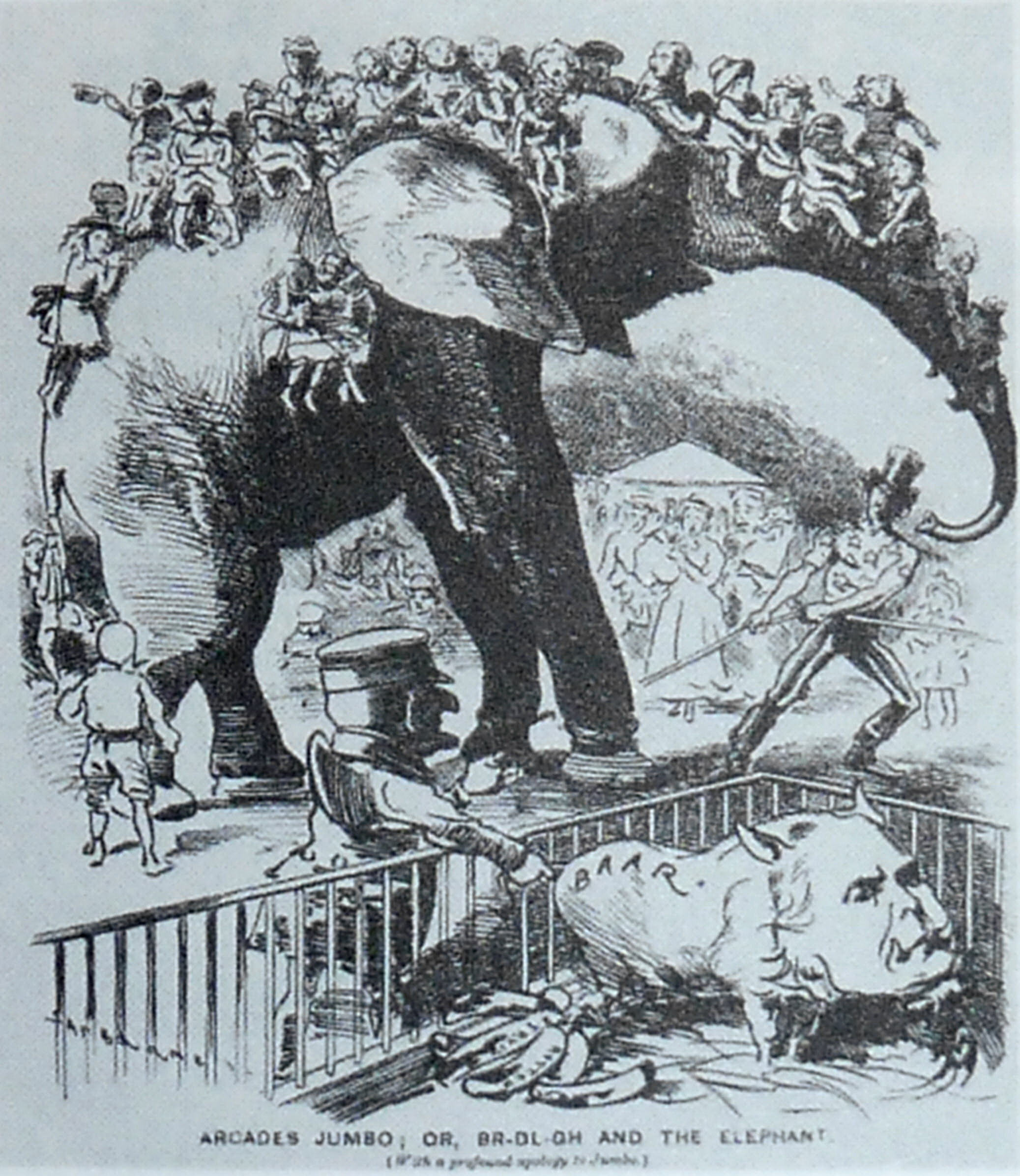 Die Karikatur Arcades Jumbo zeigt Mr. Punch, der P.T. Barnum vorschlägt, lieber den Politiker Charles Bradlaugh statt Jumbo in die USA mitzunehmen.